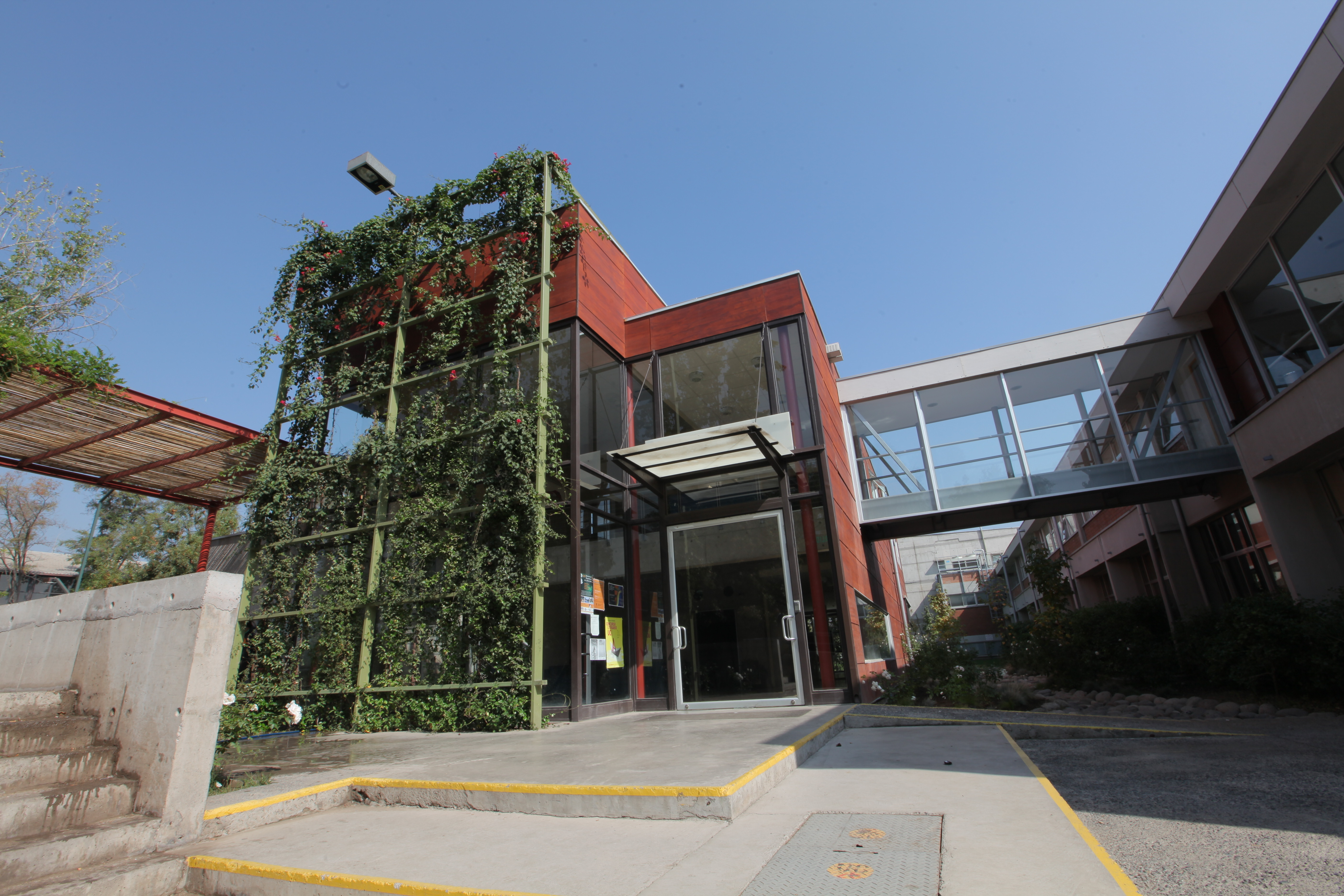 Infraestructura de la Facultad de Matemática UC